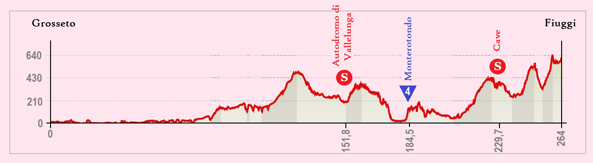 Perfil de la 7.ª etapa del Giro de Italia 2015